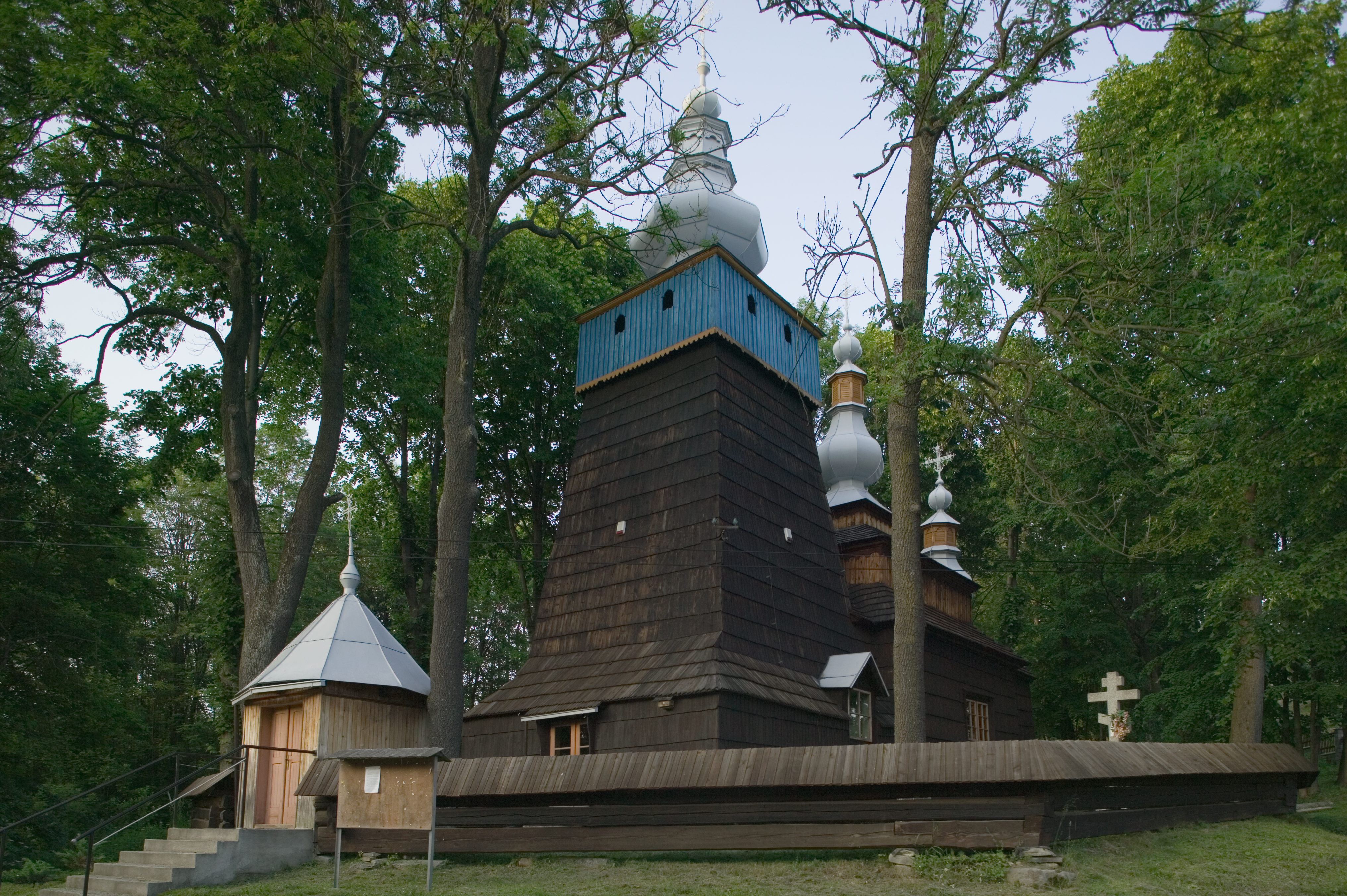 Bielanka, Cerkiew Opieki Matki Bożej